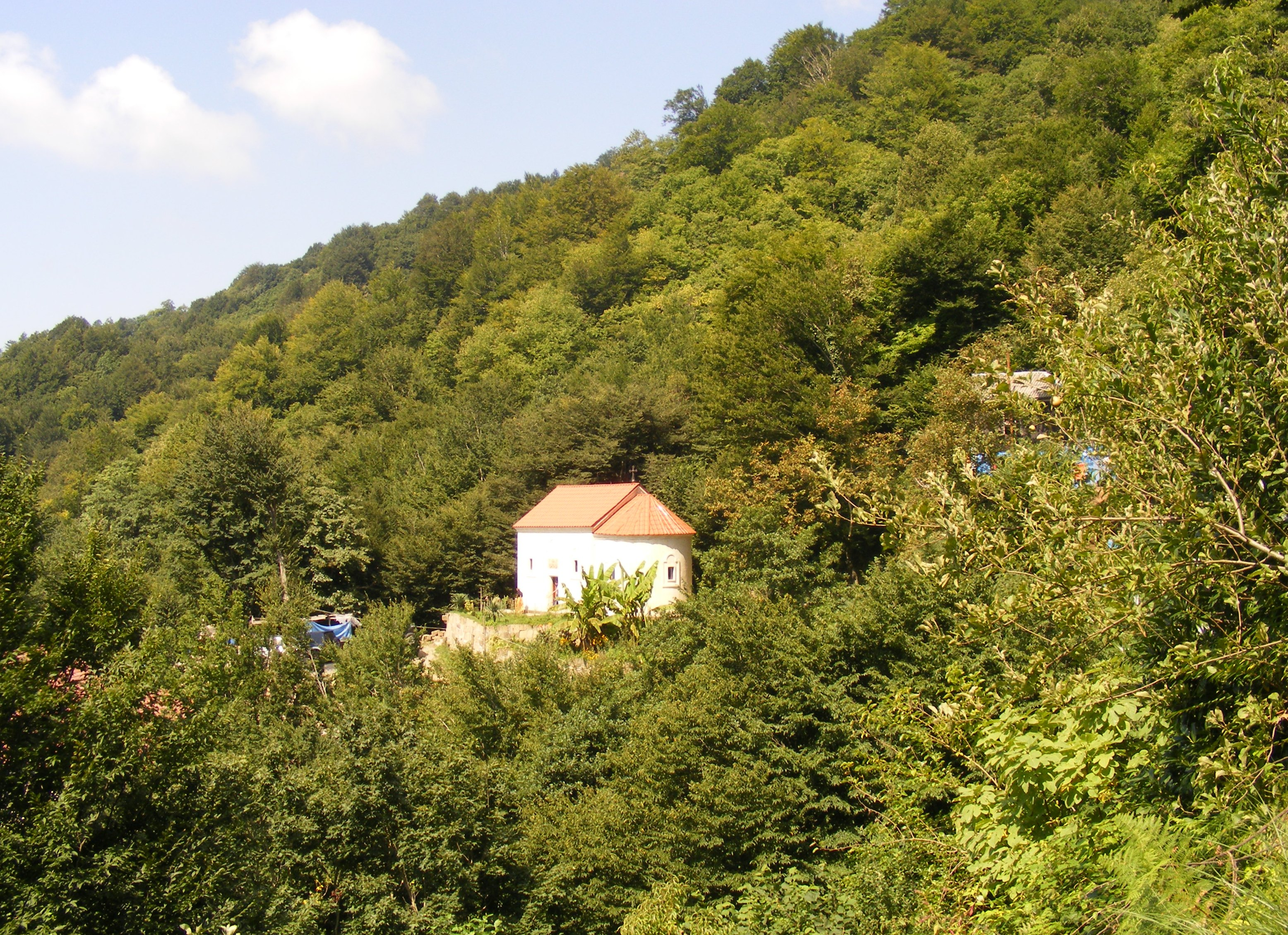 გურიის უდაბნოს სავანე, ჩოხატაურის მუნიციპალიტეტი, გურია